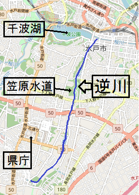 茨城県水戸市を流れる逆川の地図（流路図）。オープンストリートマップを改変し作成。 This map may be incomplete, and may contain errors. Don't rely solely on it for navigation.